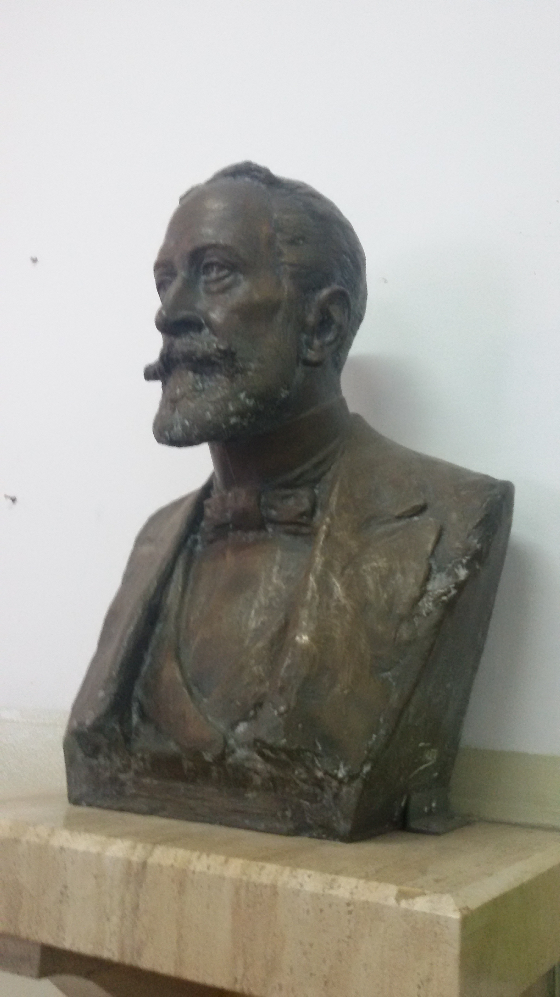 Busto donado por el hijo